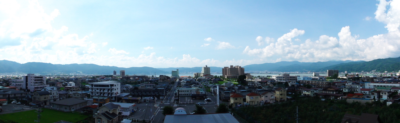 高島城の天守から諏訪湖方面をパノラマで。